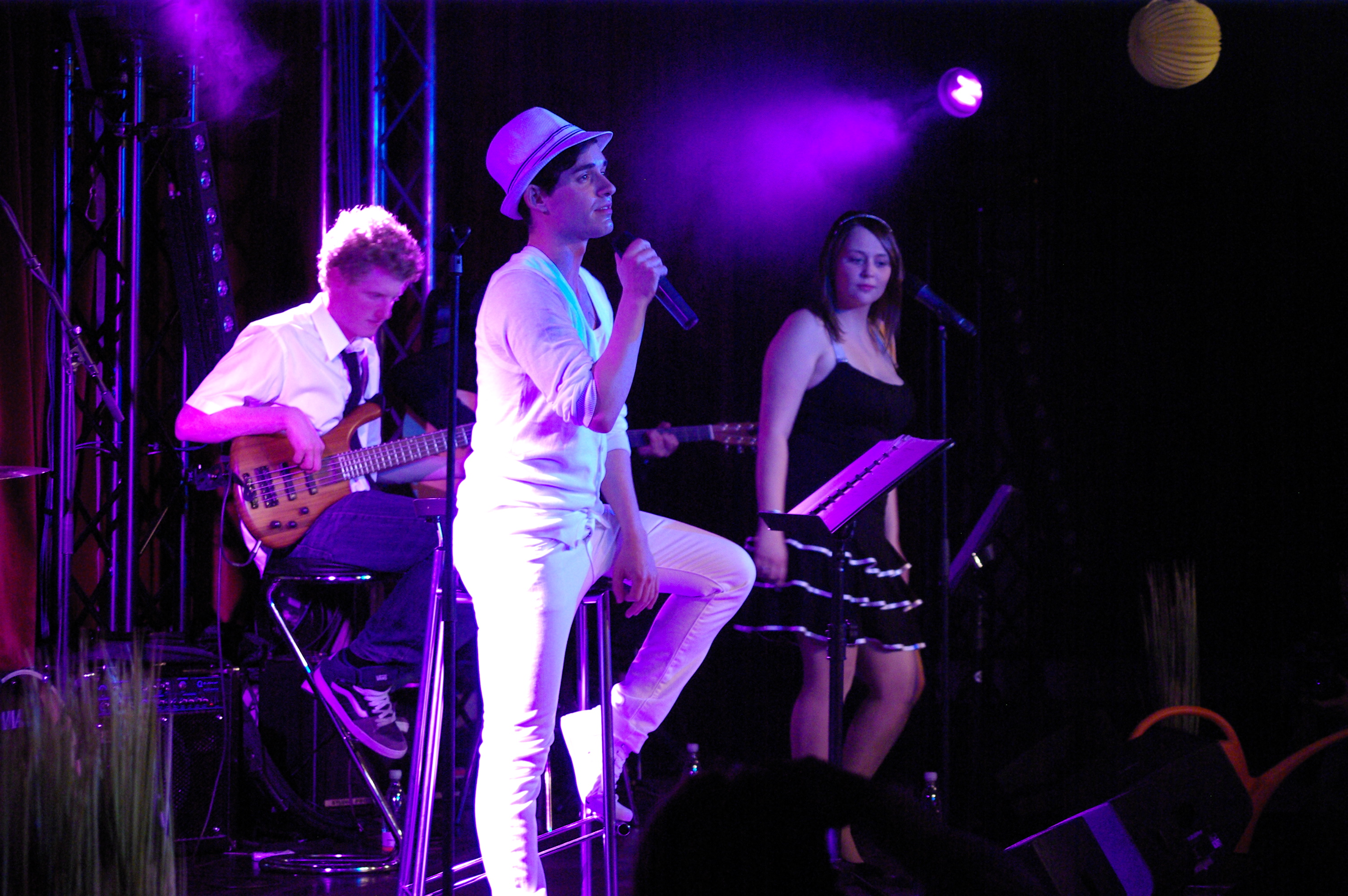 Daniel Küblböck Schrebergarten-Tour Berlin Tempodrom 2011